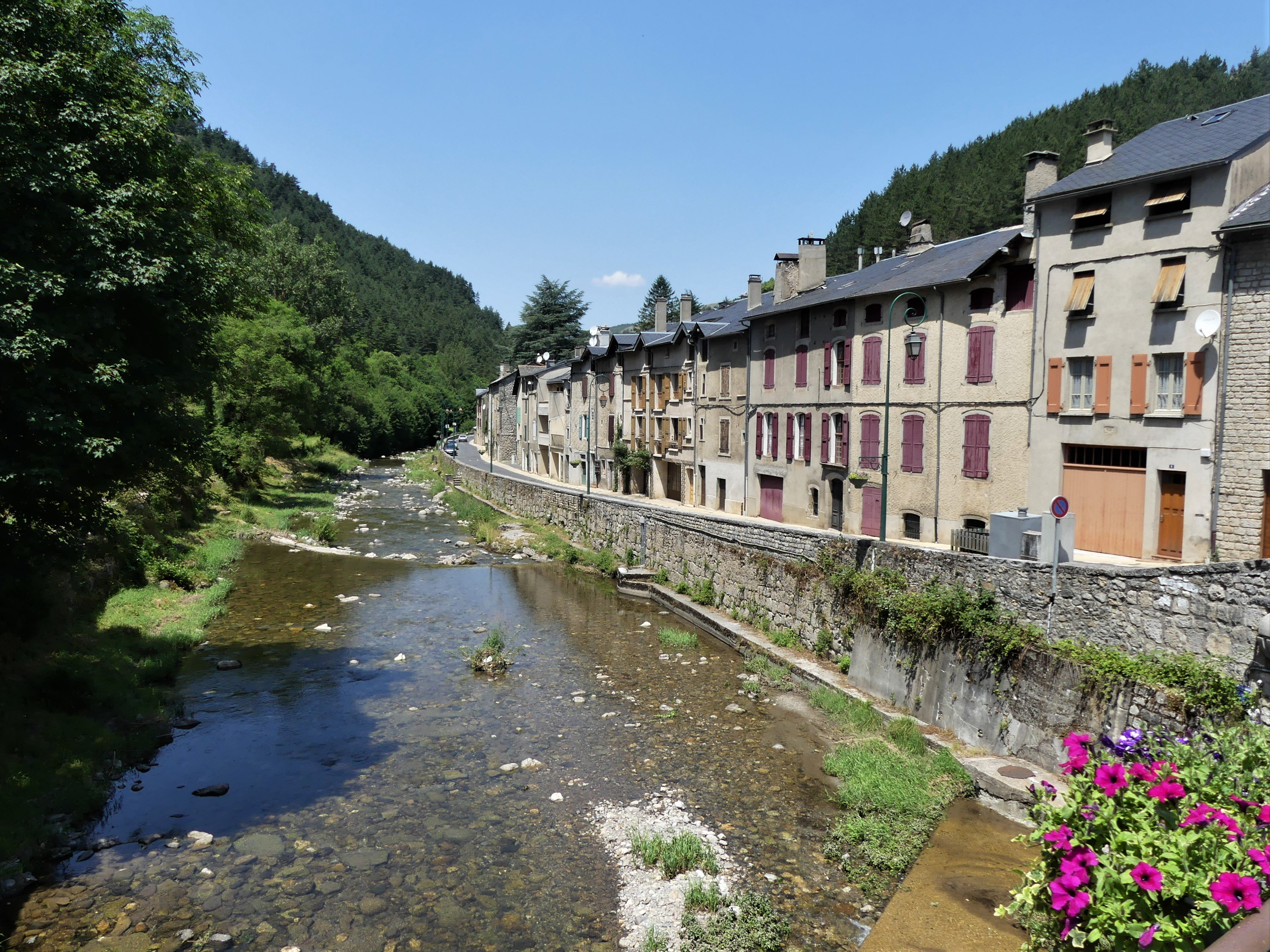 La Jonte vue depuis le pont ouest en direction de l'aval, Meyrueis, Lozère, France.